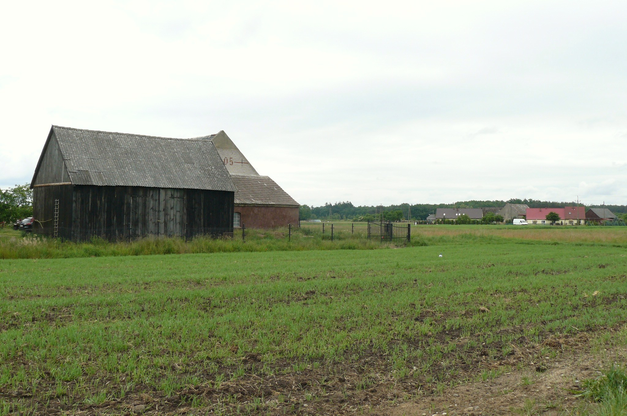 Marzenin - wieś koło Drezdenka.